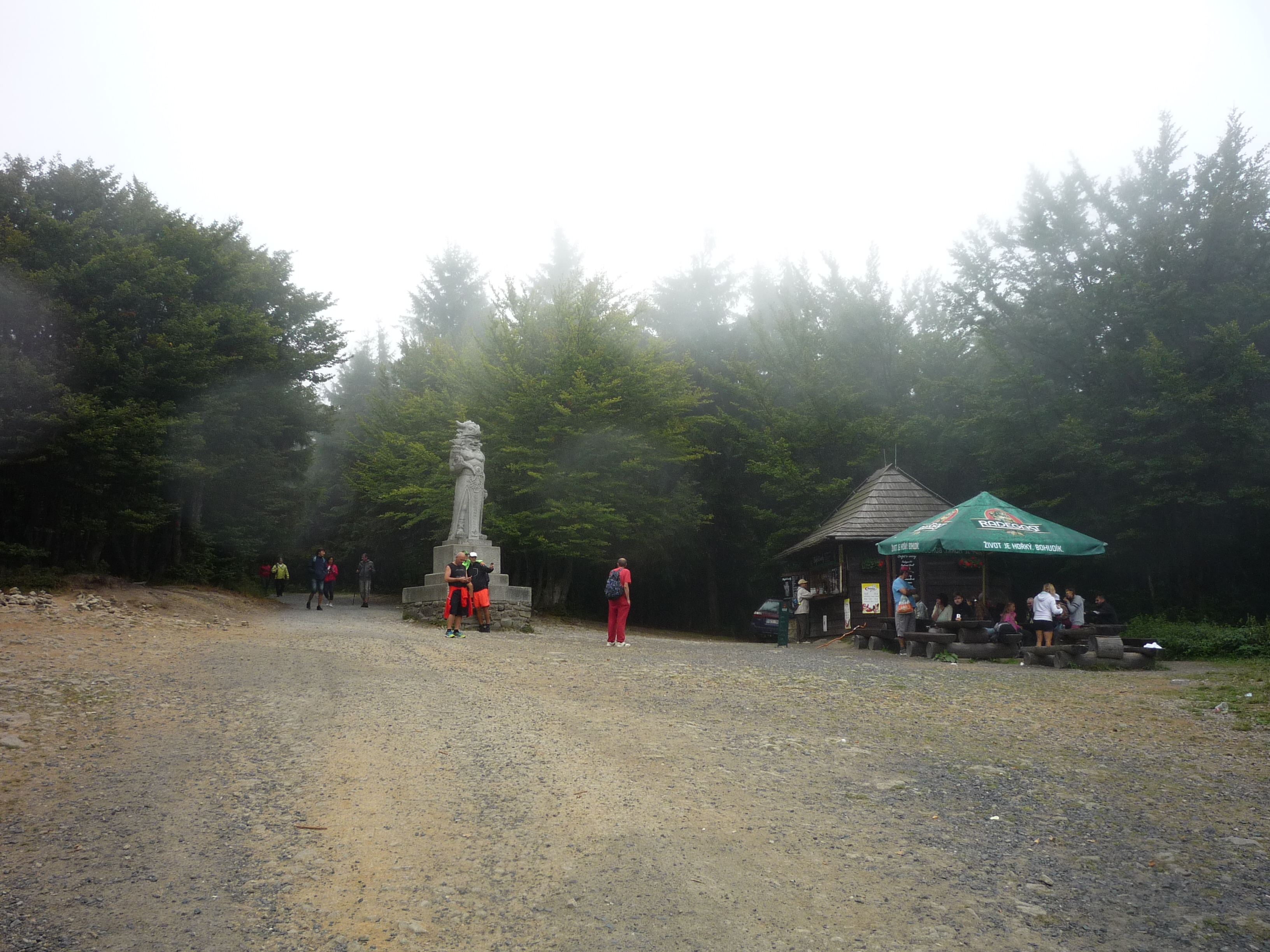 Autor fotografie Jiří Zelenka.Socha Radegasta, slovanského pohanského boha slunce, hojnosti a úrody je jedním z nezaměnitelných symbolů Radhoště v Beskydech, respektive sedla pod Radhoštěm nacházejícího se přesně v polovině cesty z Pusteven na Radhošť v nadmořské výšce 1 105 m. Prostřední Bečva. Okres Vsetín. Zlínský kraj. Czech Republic.